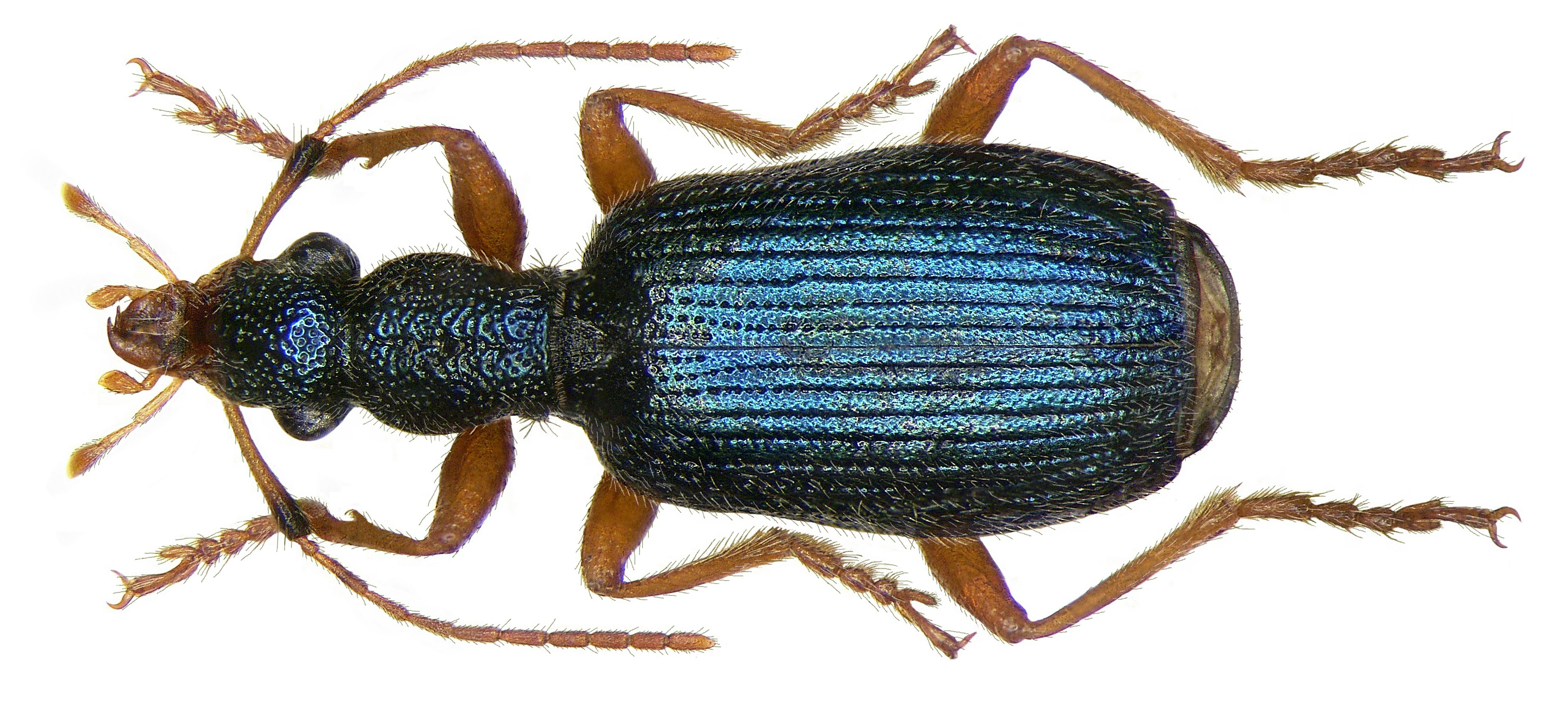 Familie: Carabidae Größe: 7-9 mm Verbreitung: Europa, Westasien, Afrika Ökologie: in Wärmegebieten Fundort: Austria, Burgenland, Breitenbrunn leg.det. G.Rößler, 1997 Foto: U.Schmidt, 2008